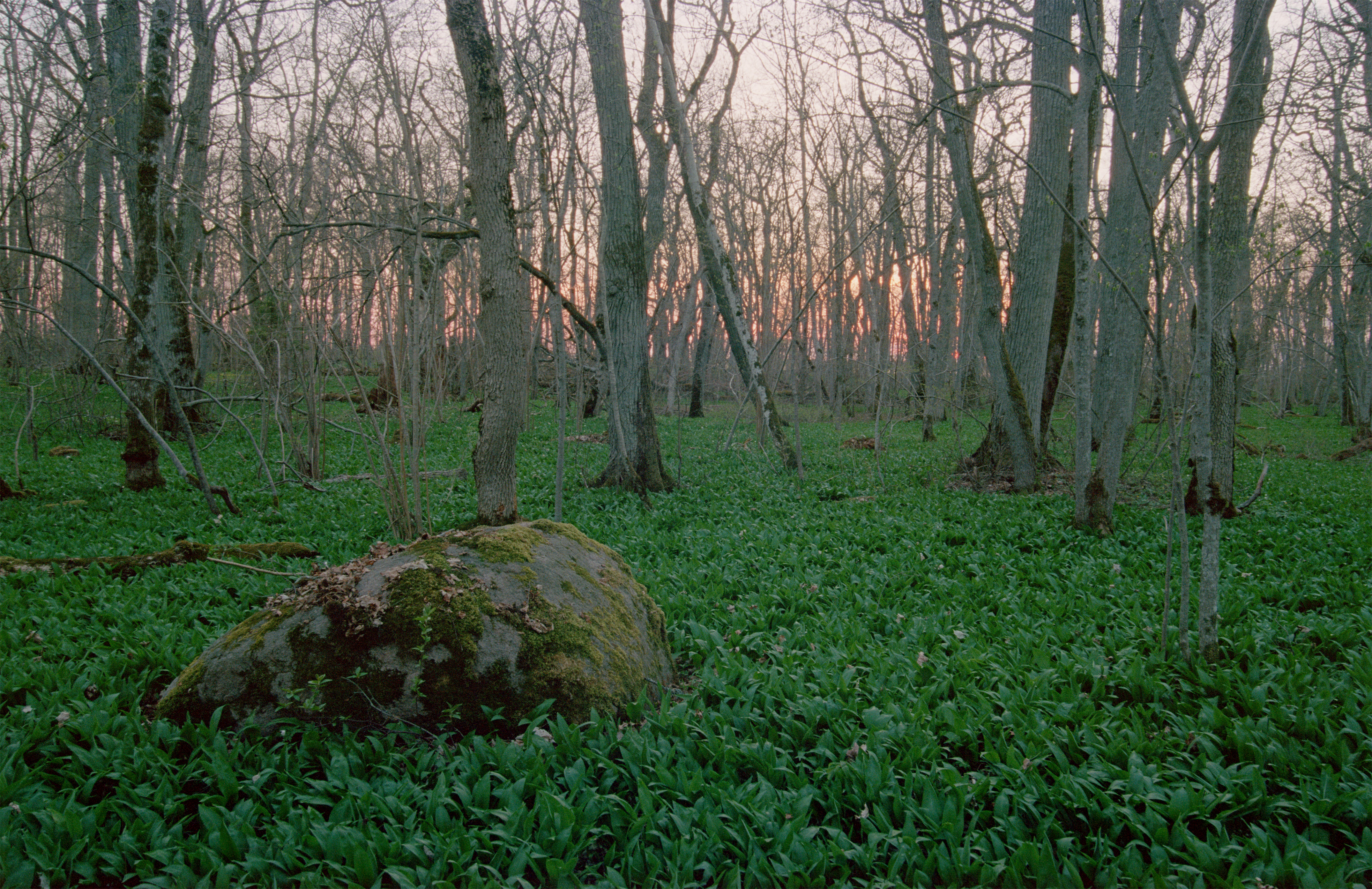 Salumets Puhtulaiul, kevadel